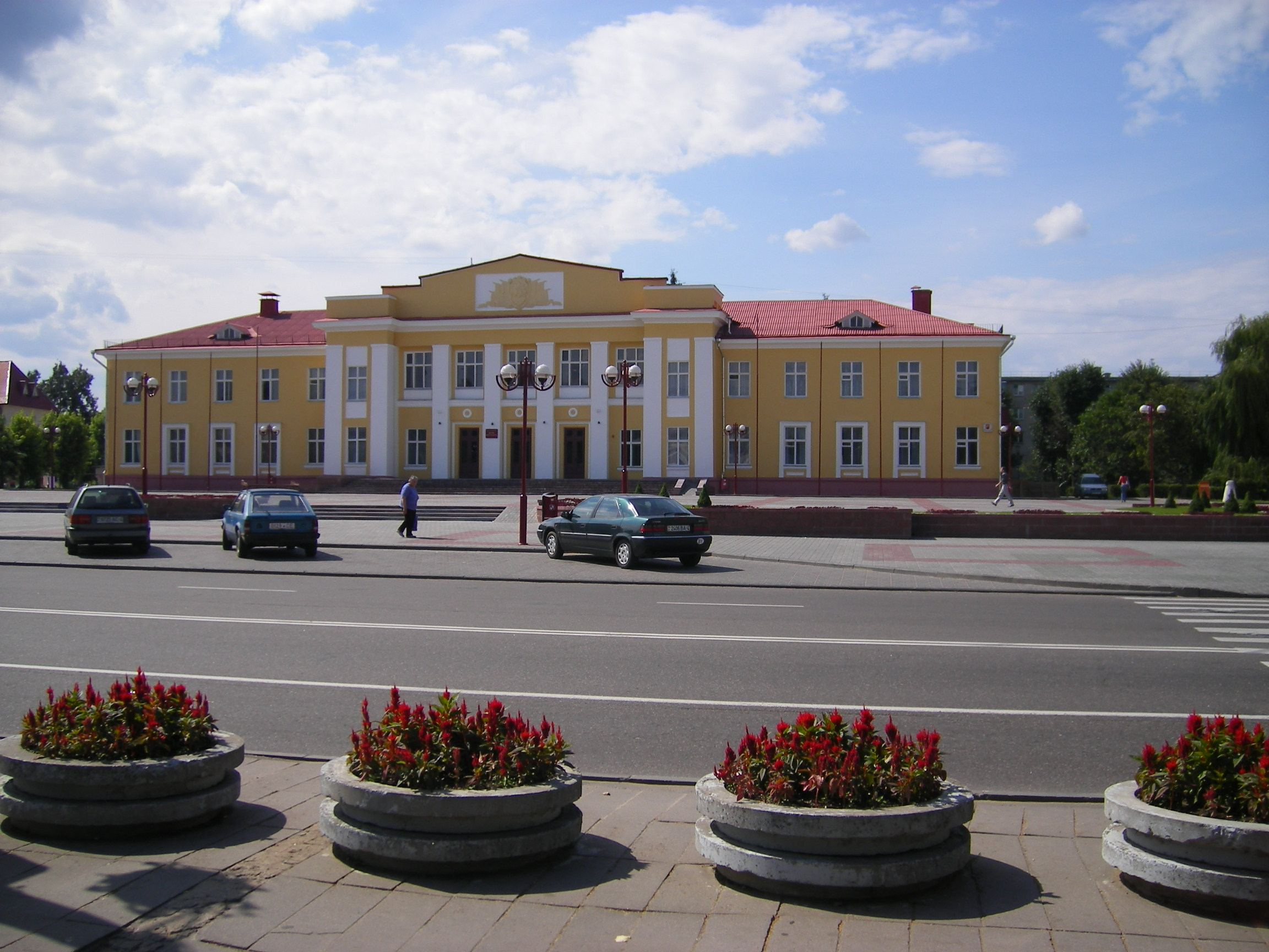 Lida, Sovetskaya street